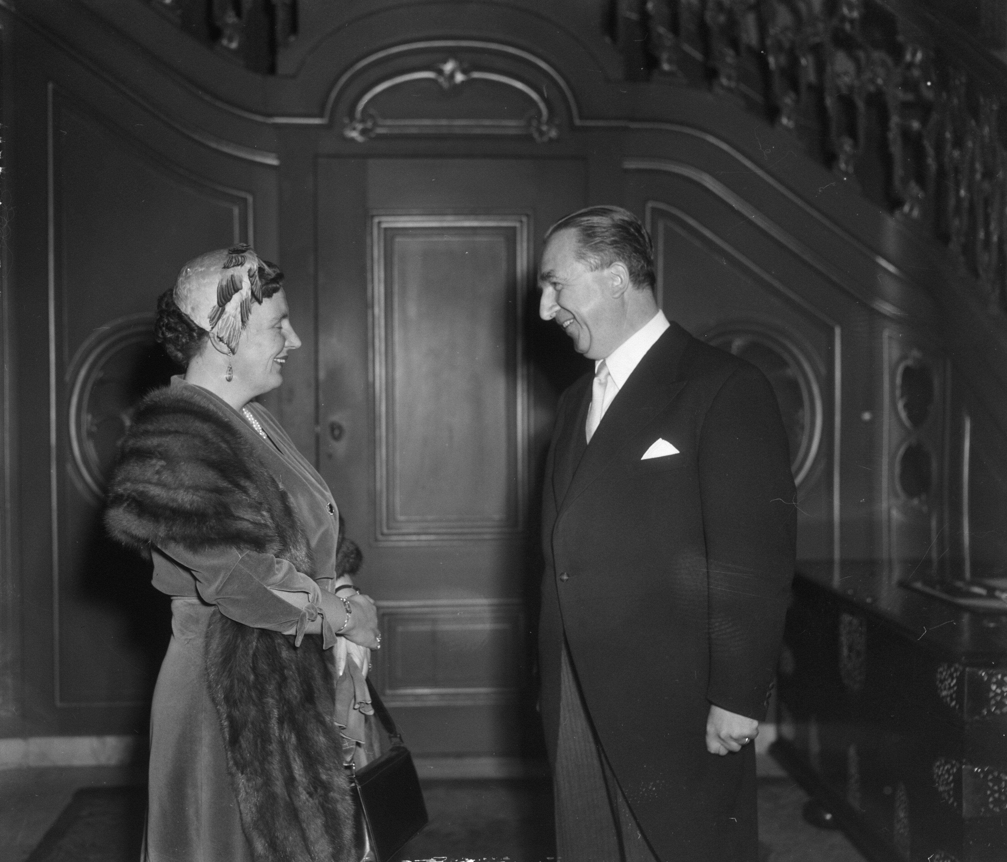 Collectie / Archief : Fotocollectie Anefo Reportage / Serie : [ onbekend ] Beschrijving : De nieuwe Amerikaanse ambassadeur in Nederland, C. Freeman Matthews wordt ontvangen door koningin Juliana voor het aanbieden van zijn geloofsbrieven Datum : 25 november 1953 Locatie : Den Haag, Zuid-Holland Trefwoorden : diplomaten, geloofsbrieven, koninginnen, koninklijk huis Persoonsnaam : Freeman Matthews, C., Juliana, koningin Fotograaf : Duinen, […] van / Anefo Auteursrechthebbende : Nationaal Archief Materiaalsoort : Negatief (zwart/wit) Nummer archiefinventaris : bekijk toegang 2.24.01.04 Bestanddeelnummer : 906-1326